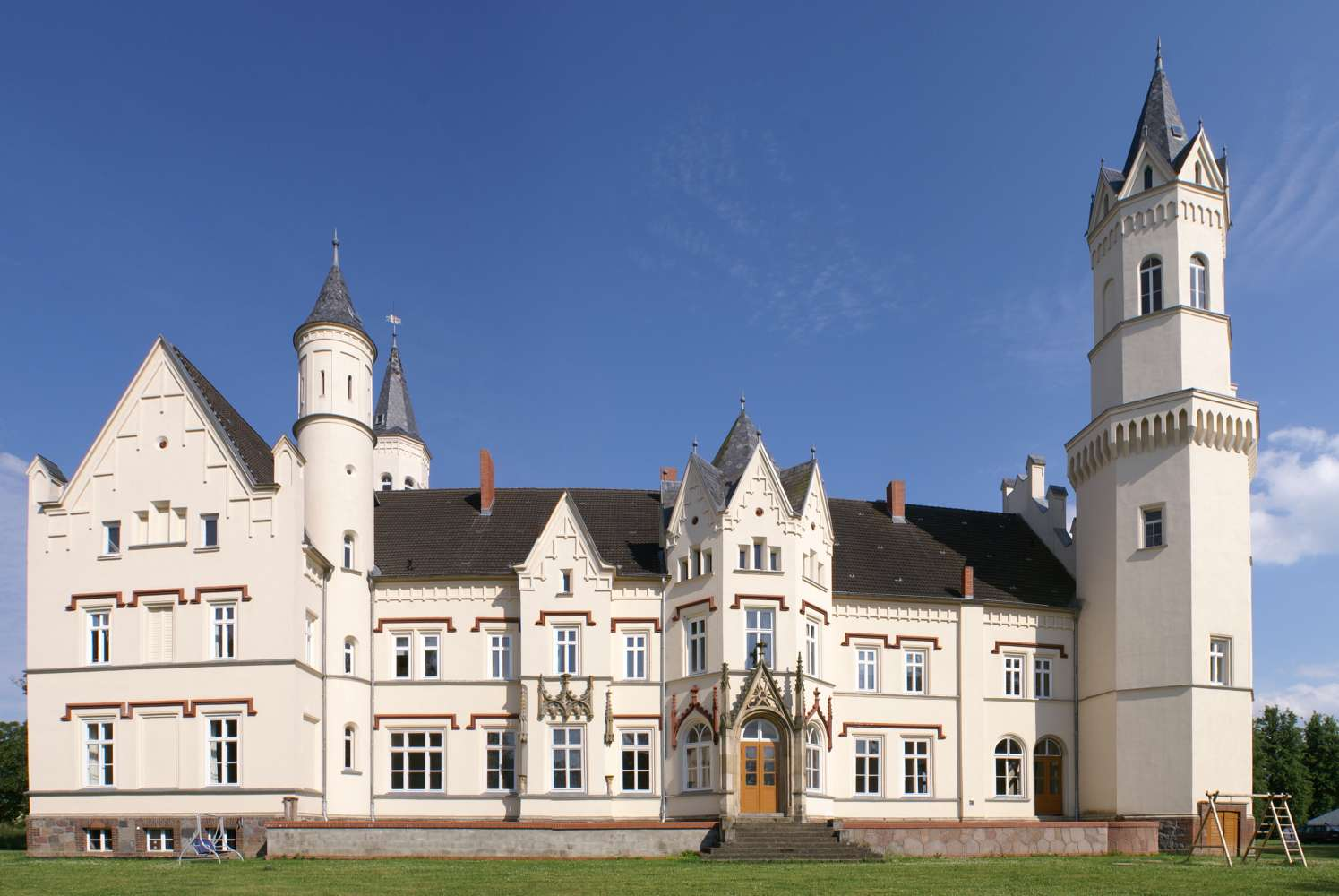 Kartlow Landkreis Demmin Schloss Westseite